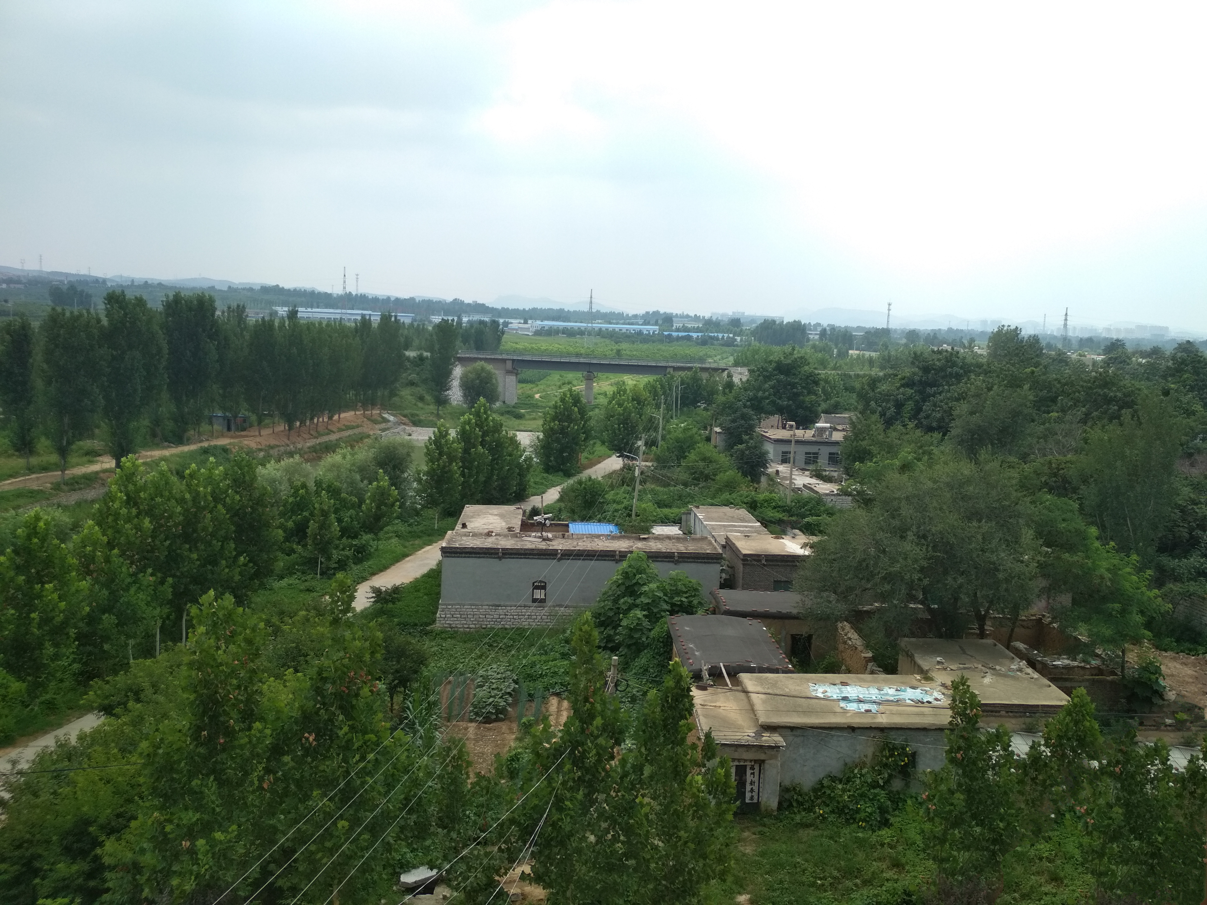 中文（中国大陆）: 潮泉街道中街